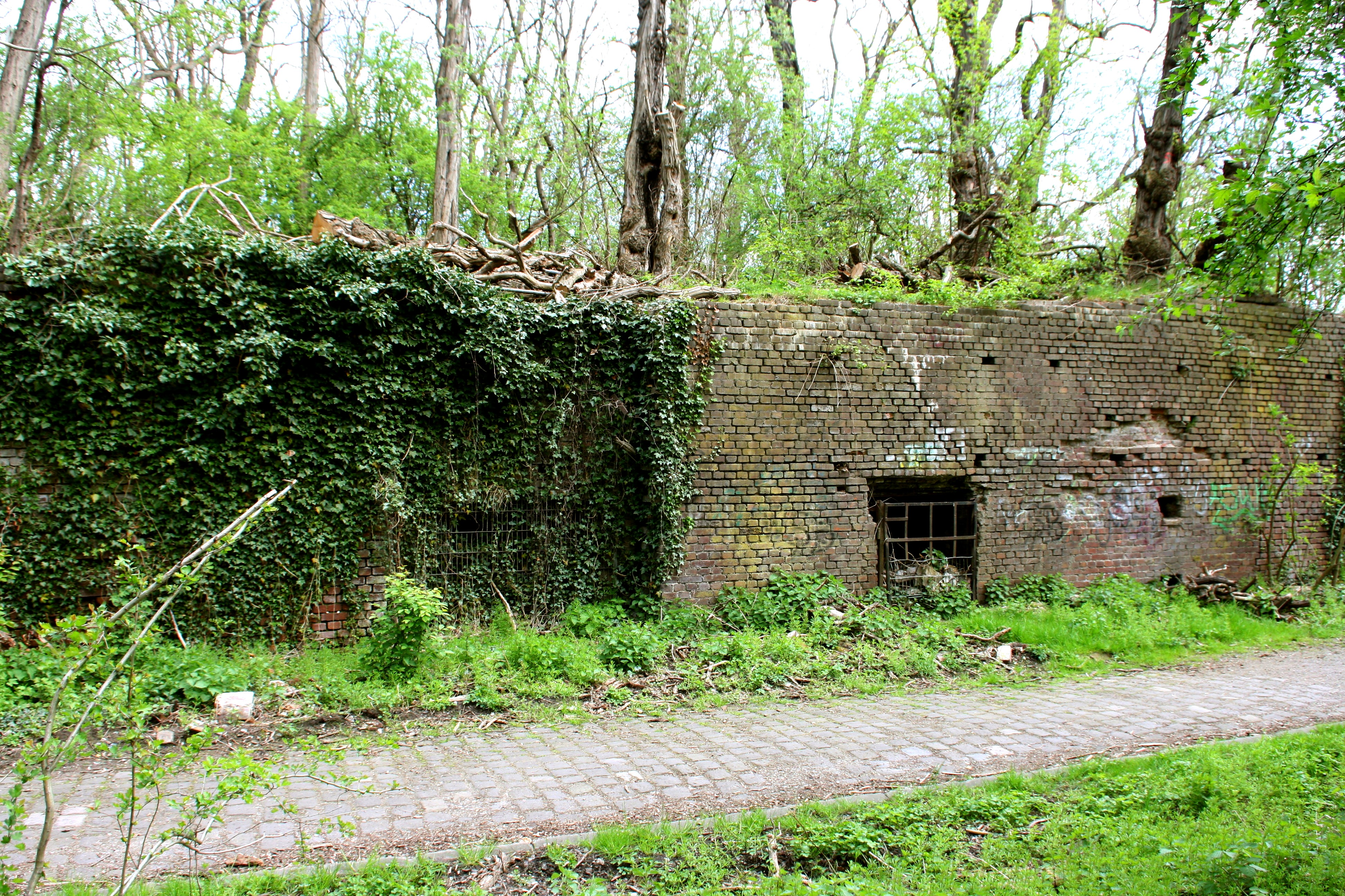 Königsgruber Park, Königsgruber Straße in Herne